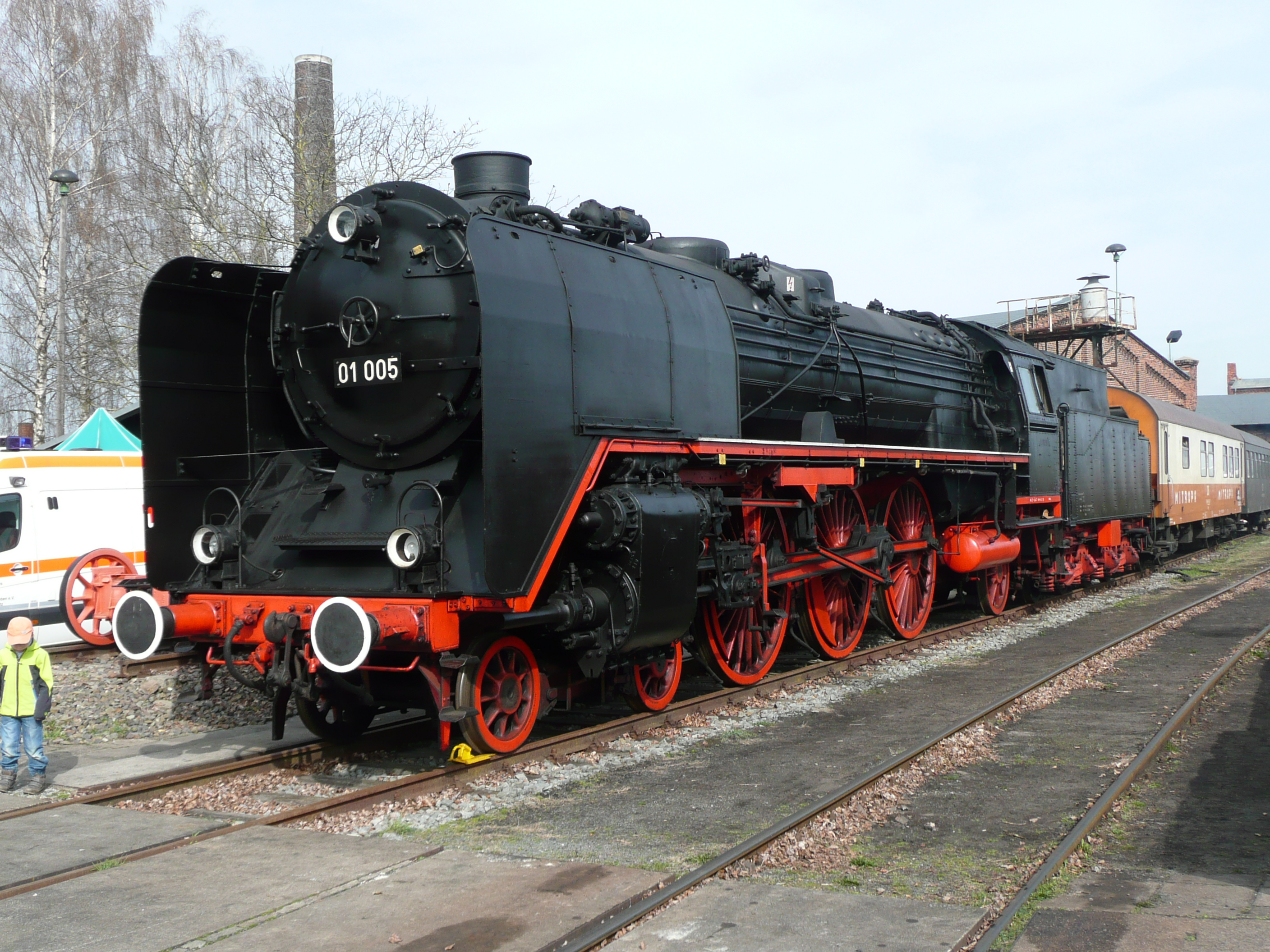 Dampflokomotive der Baureihe 01 im Traditionsbetriebswerk Staßfurt.